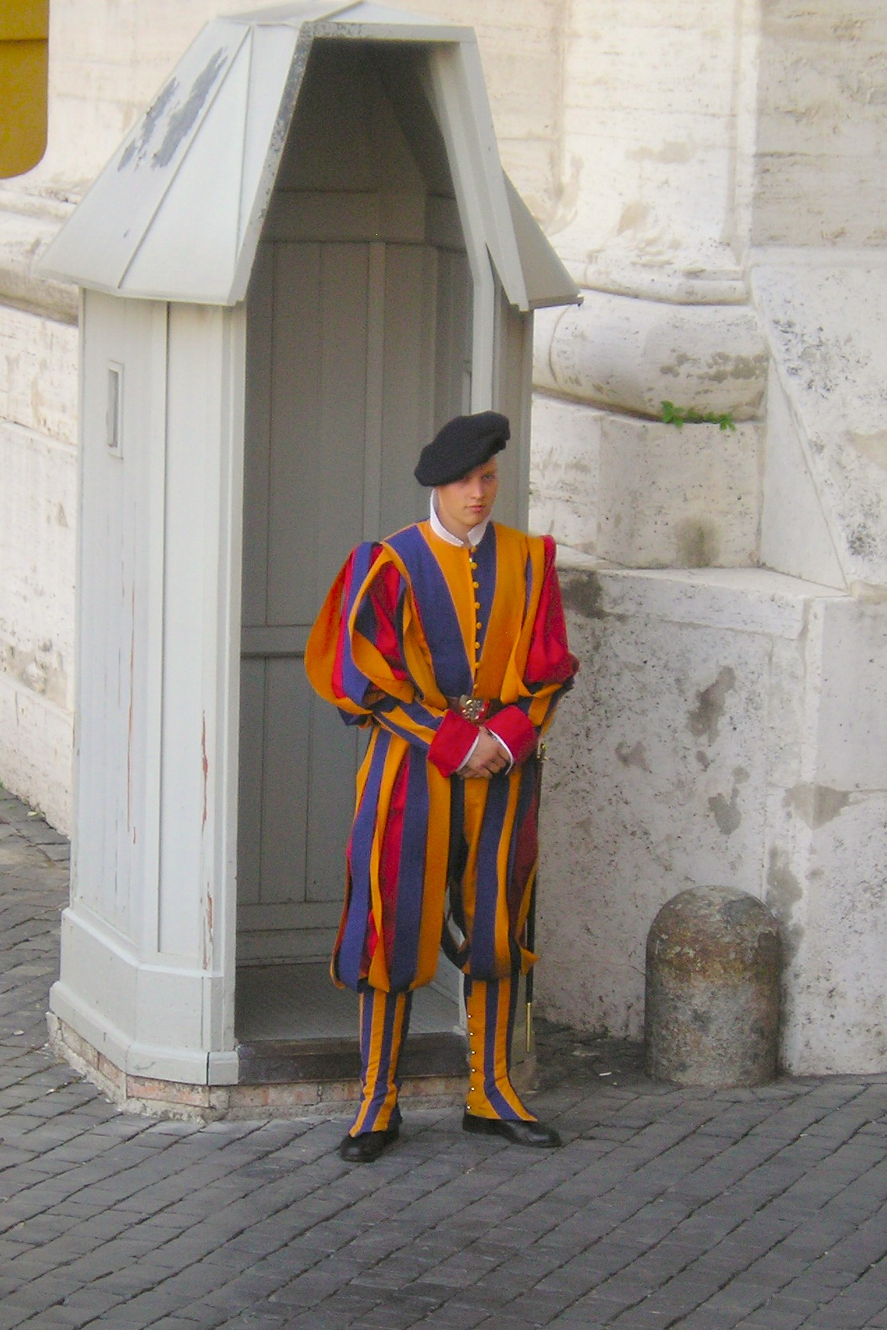 Vatican - guard